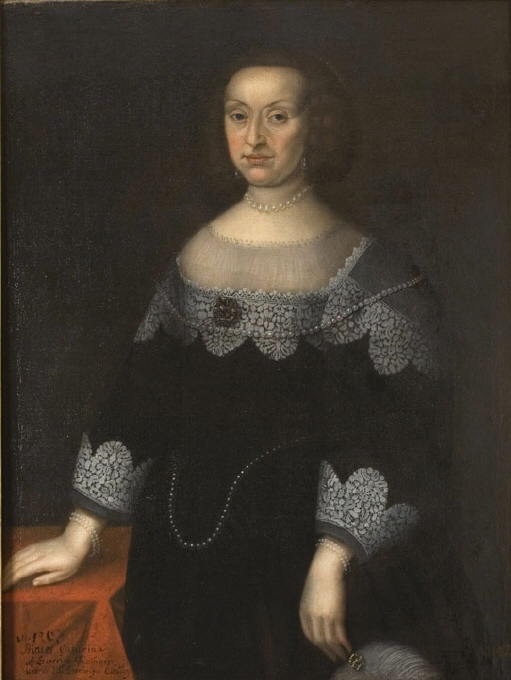 Katarina, 1584-1638, prinsessa av Sverige, pfalzgrevinna av Zweibrücken